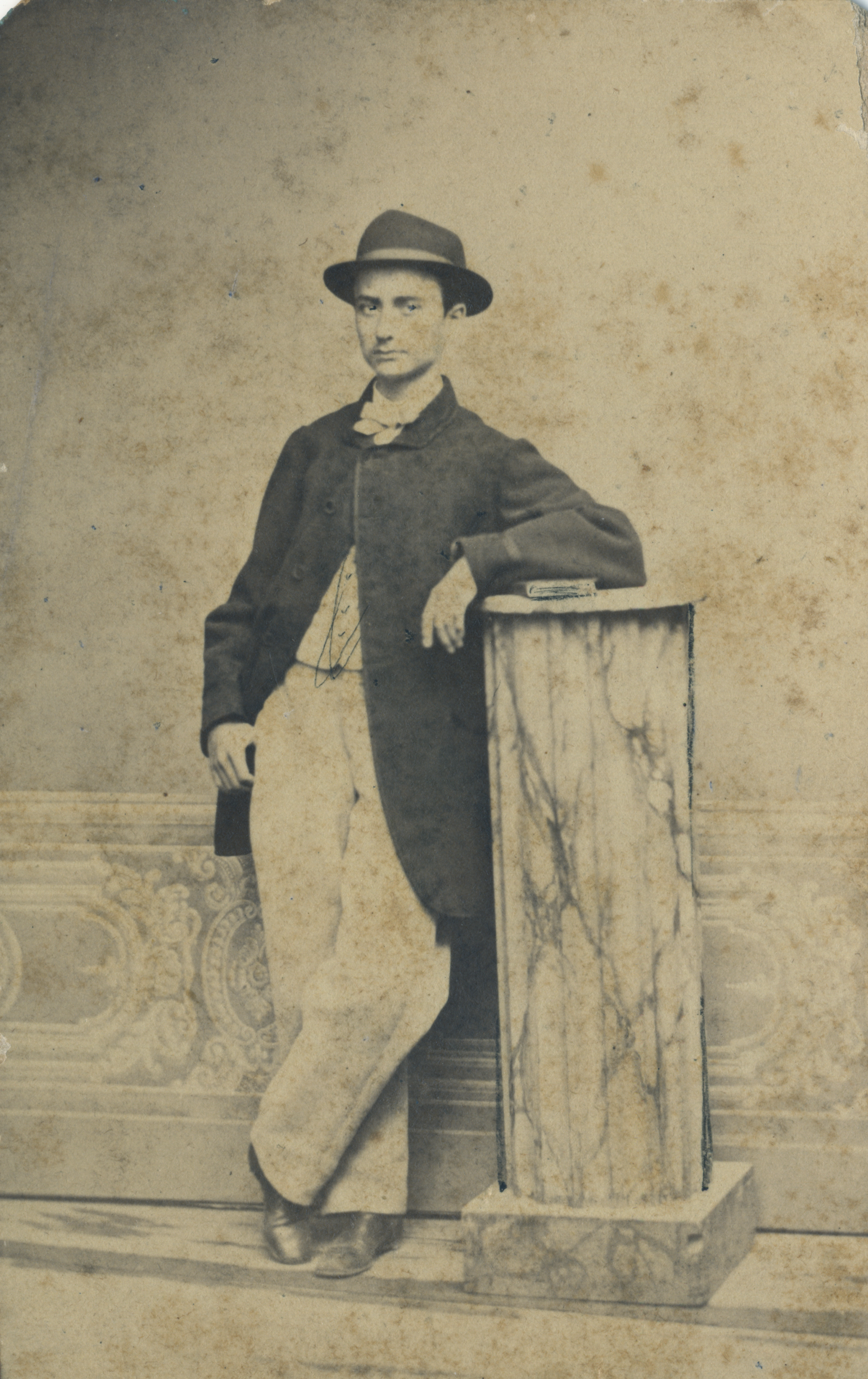 Giuseppe Patiri da giovane